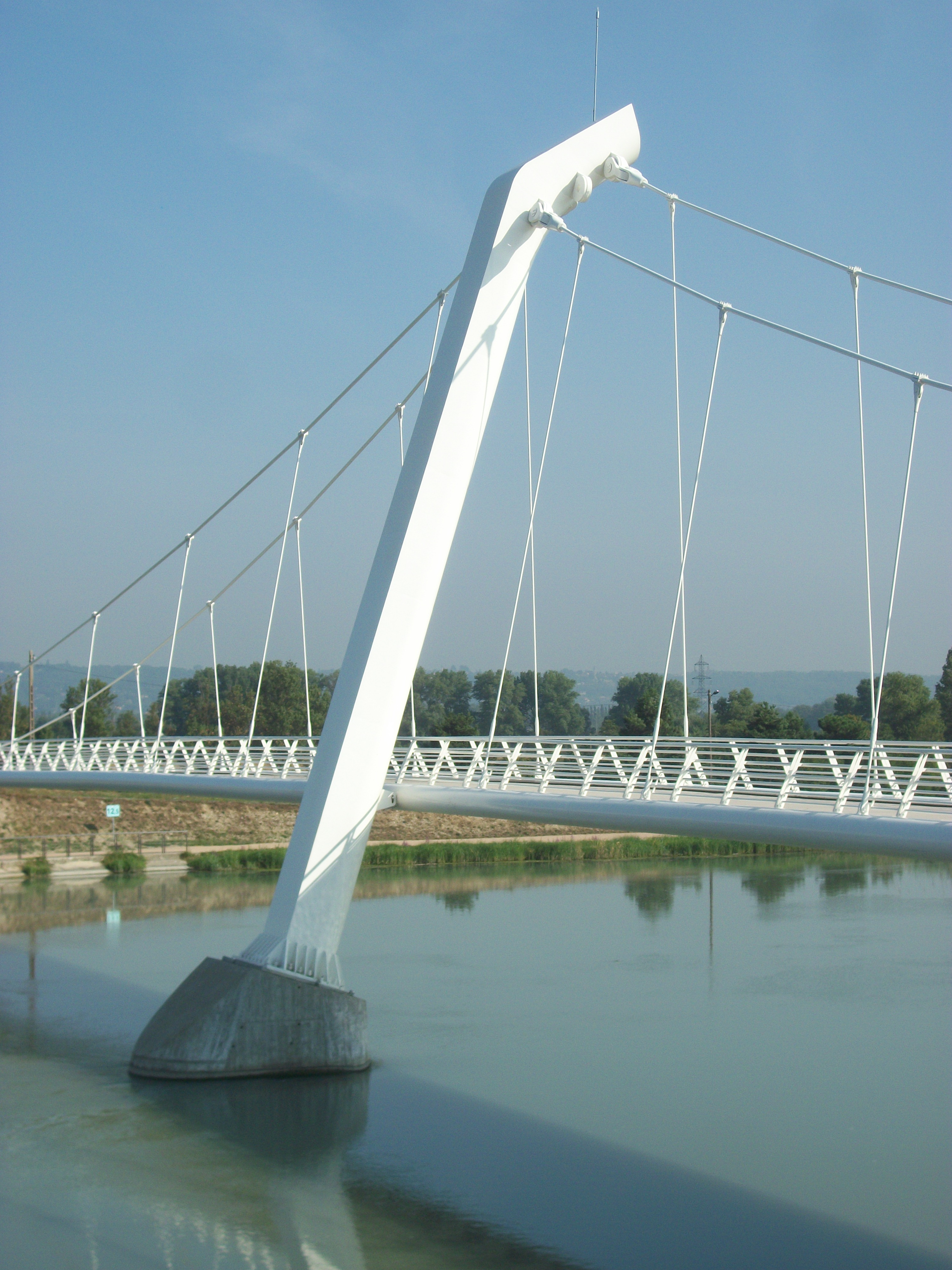 Passerelle Nelson-Mandela à Décines Object location45° 46′ 31.69″ N, 4° 57′ 14.08″ E Vue du pilier central